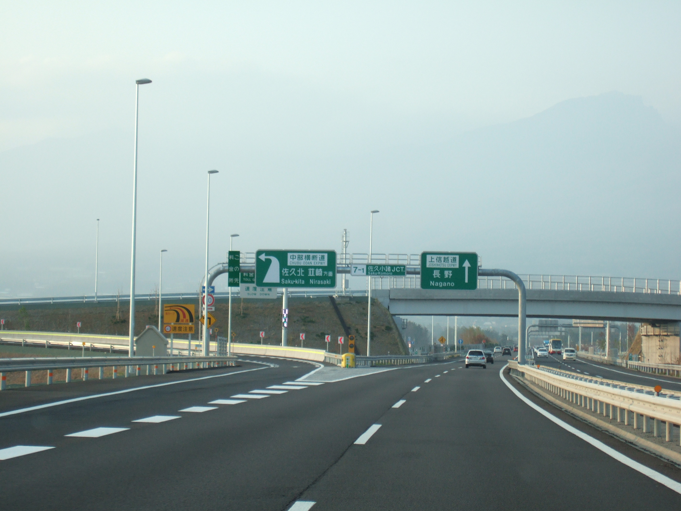 佐久小諸JCT下り分岐